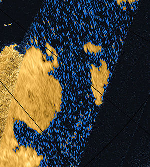 ベイタ海峡と周辺の地形